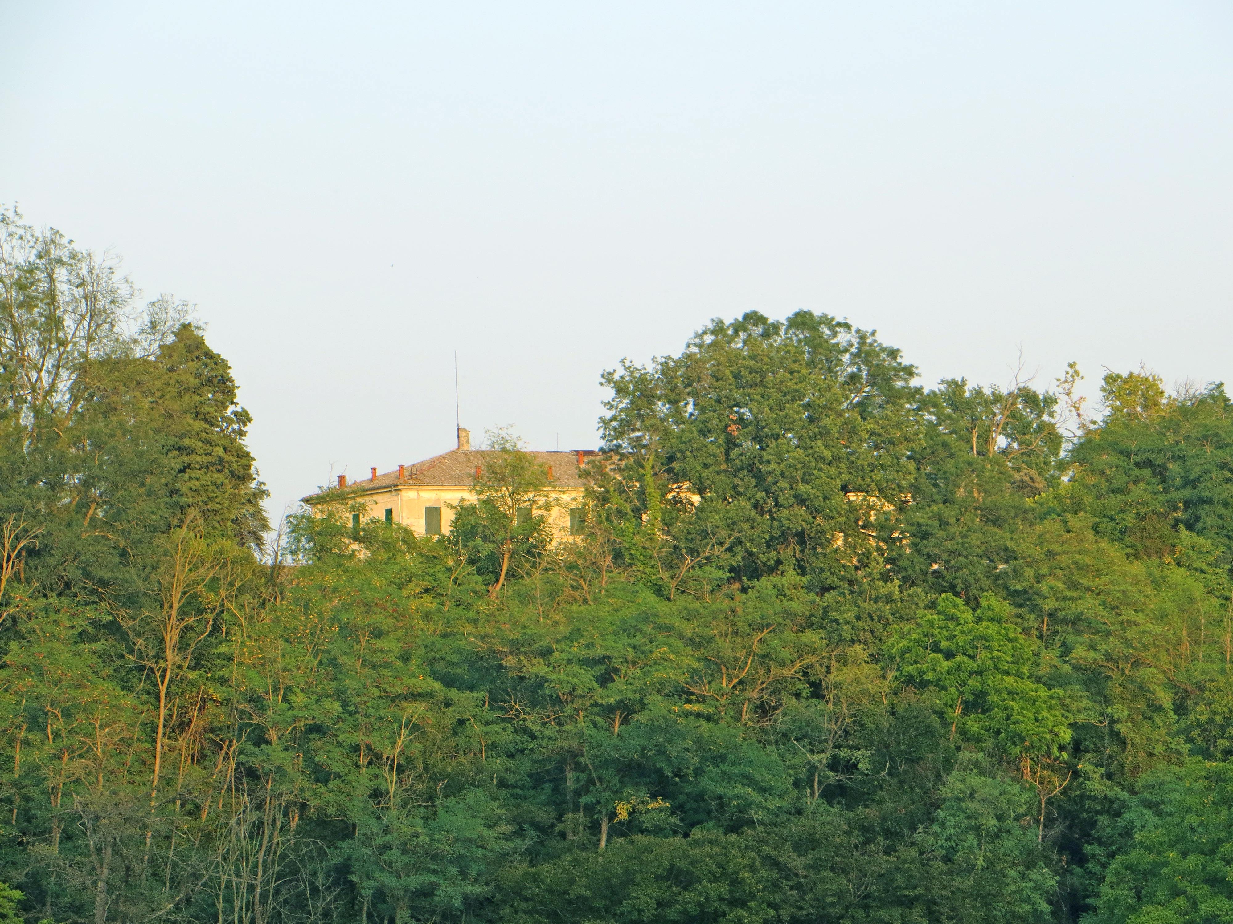 Retro della villa del Casino dei Boschi